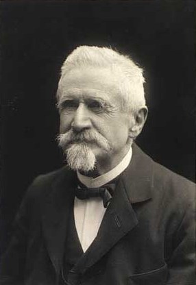 Geert Marinus Holbek (1826-1910), Danish general